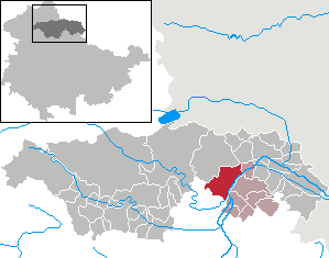 Oldisleben in Thuringia - Kyffhäuserkreis